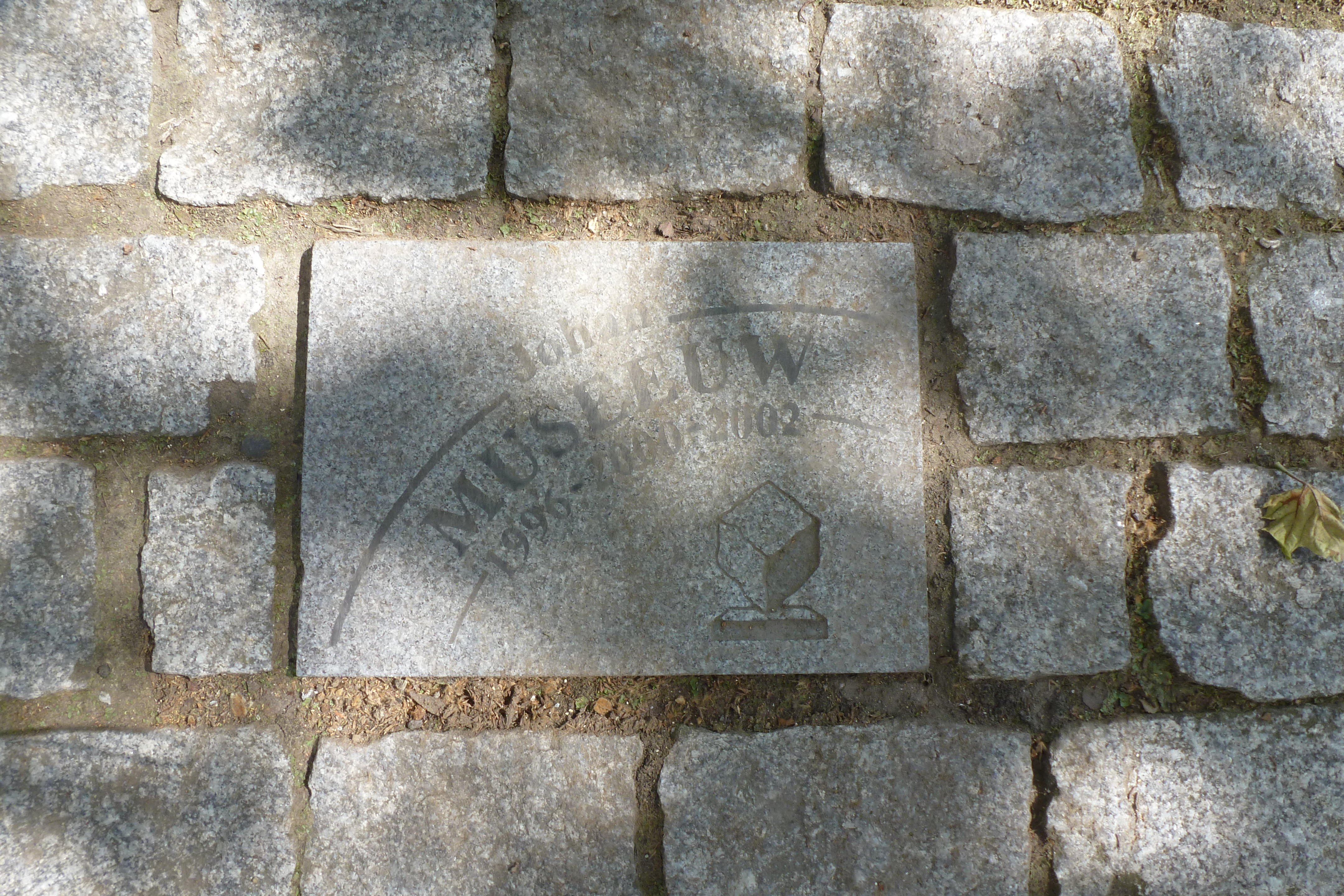 Pflasterstein für Johan Museeuw auf der Allée Charles Crupelandt in Roubaix